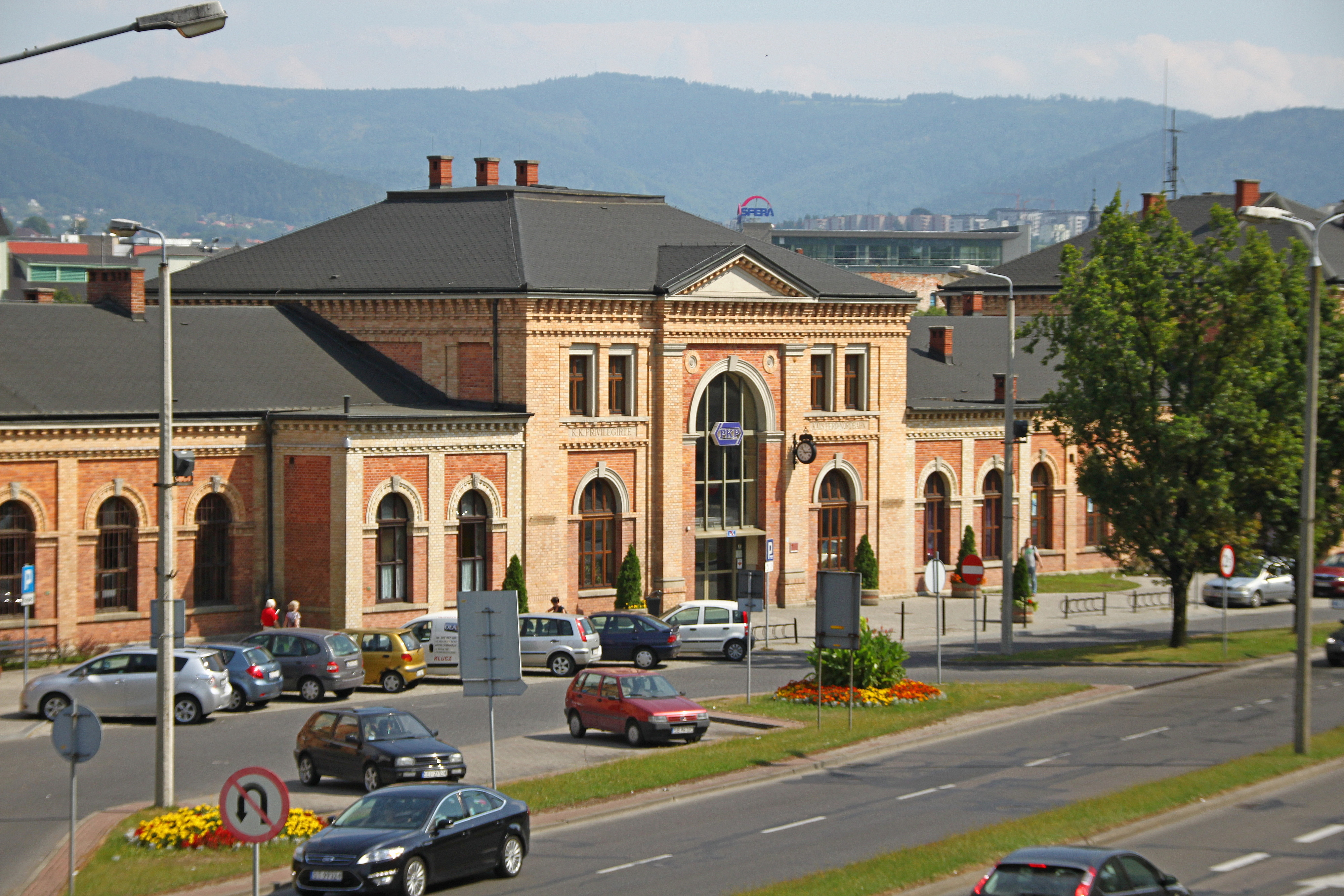 Bielsko-Biała, dworzec kolejowy - Główny, 1889-1890